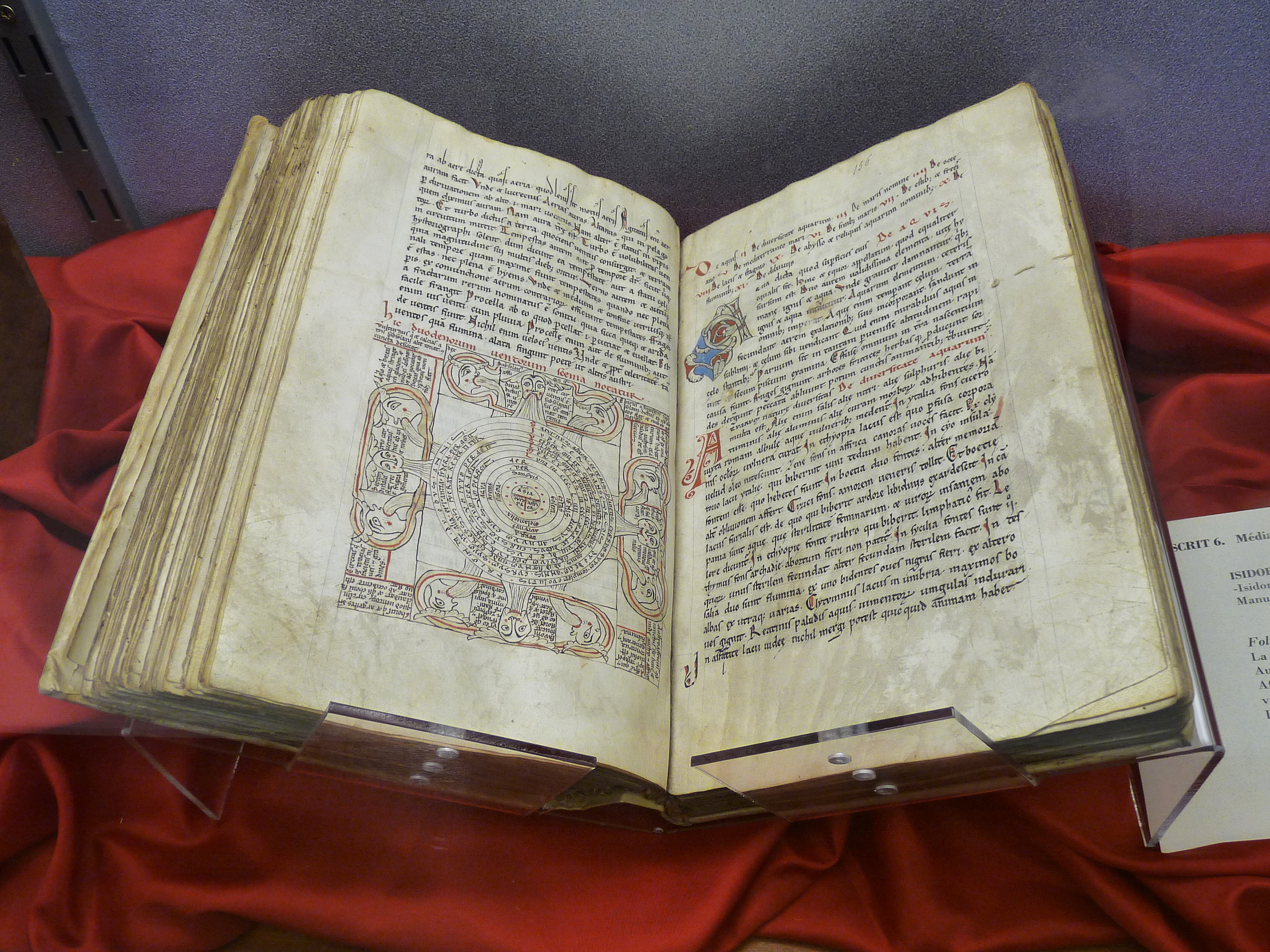 Isidore de Séville. Isidori Etymologiae, manuscrit in folio sur velin provenant de l'abbaye d'Etival, XIIe siècle. Conservé dans la salle du Trésor de la Médiathèque Victor-Hugo de Saint-Dié-des-Vosges